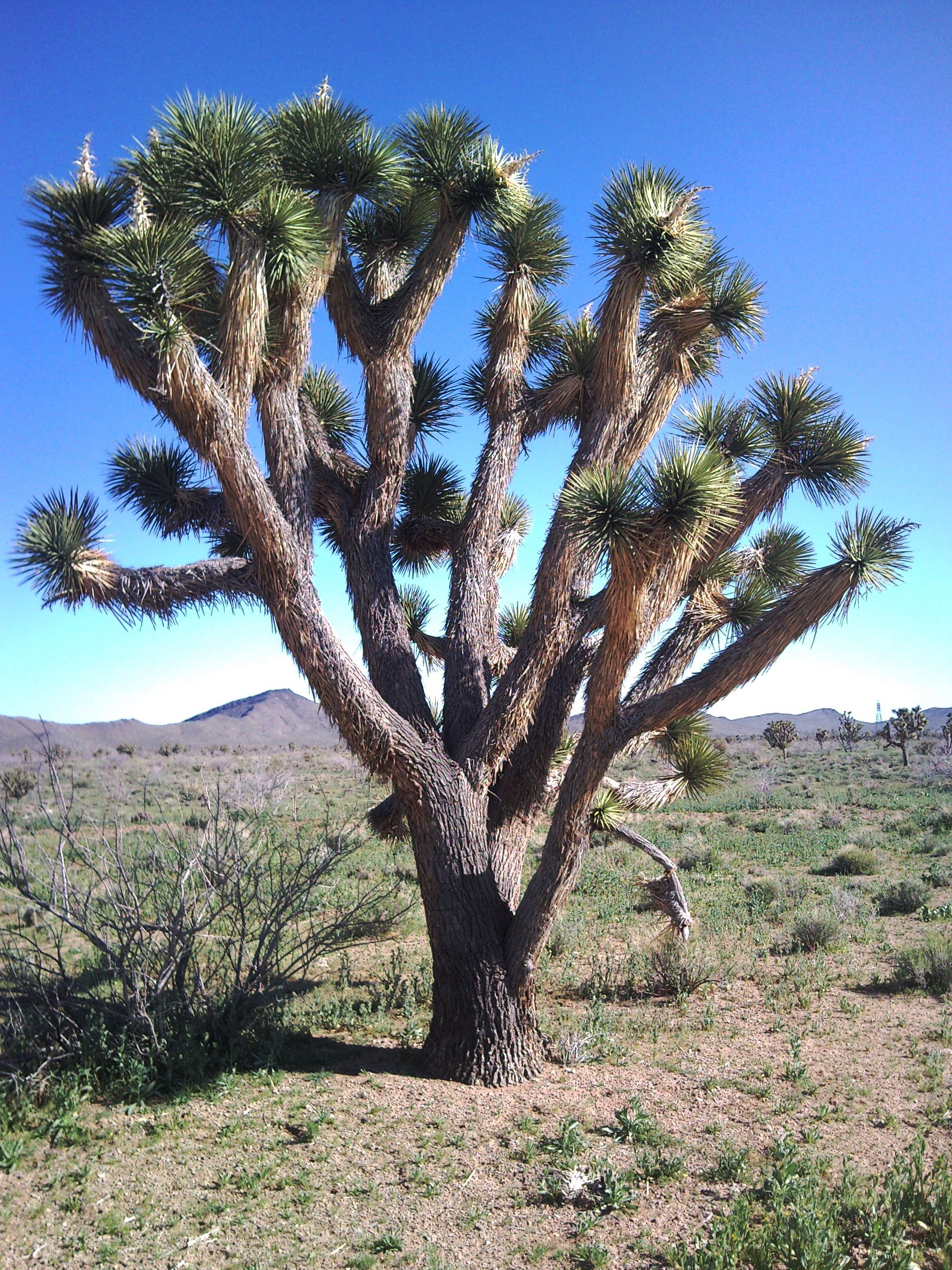 kaktus drzewiasty Arizona